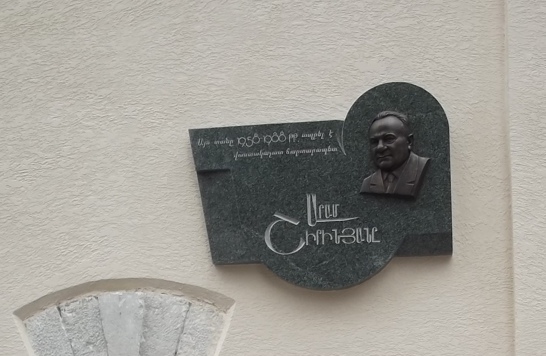 мемориальной доска Шириняну Араму Аванесовичу в Степанакерте